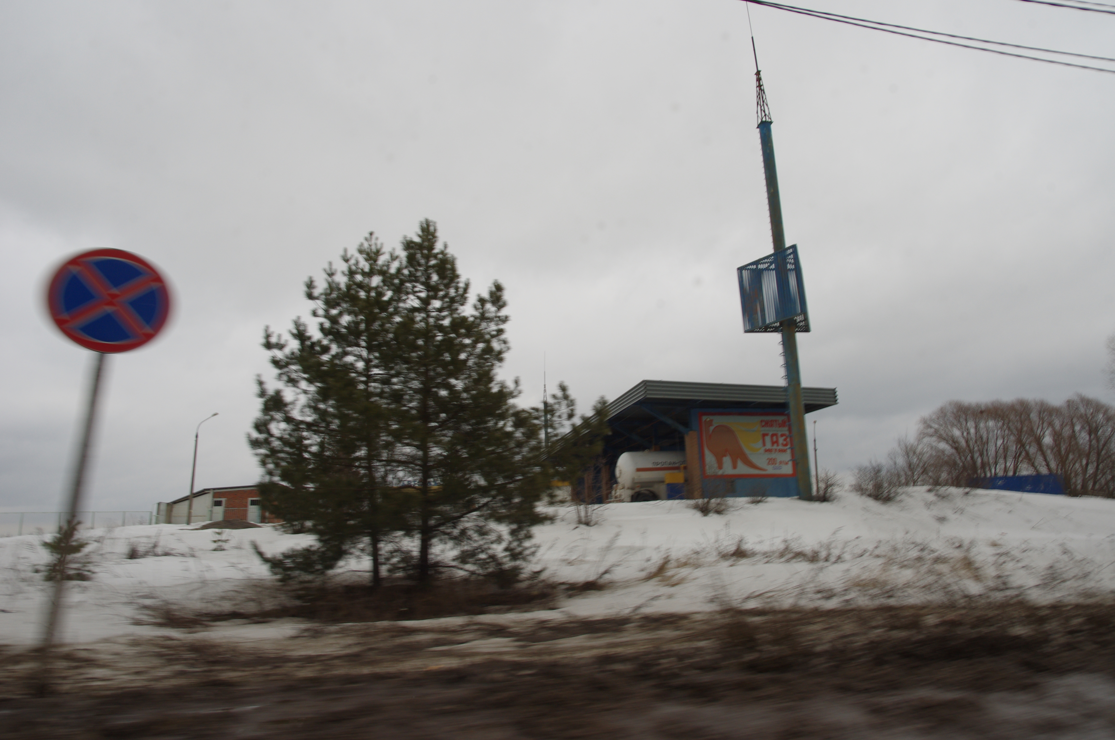 Dergaevo, Moskovskaya oblast', Russia, 140103